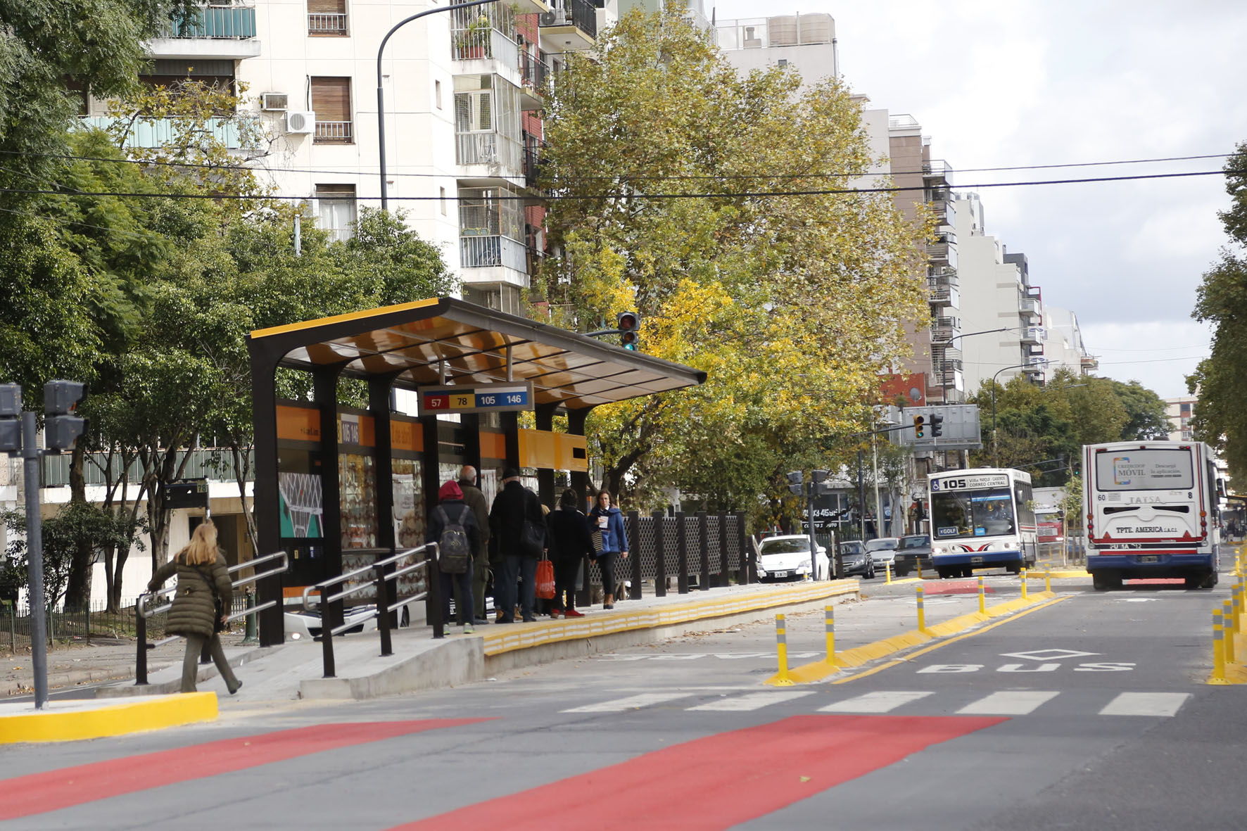 Metrobus sobre la avenida San Martín.